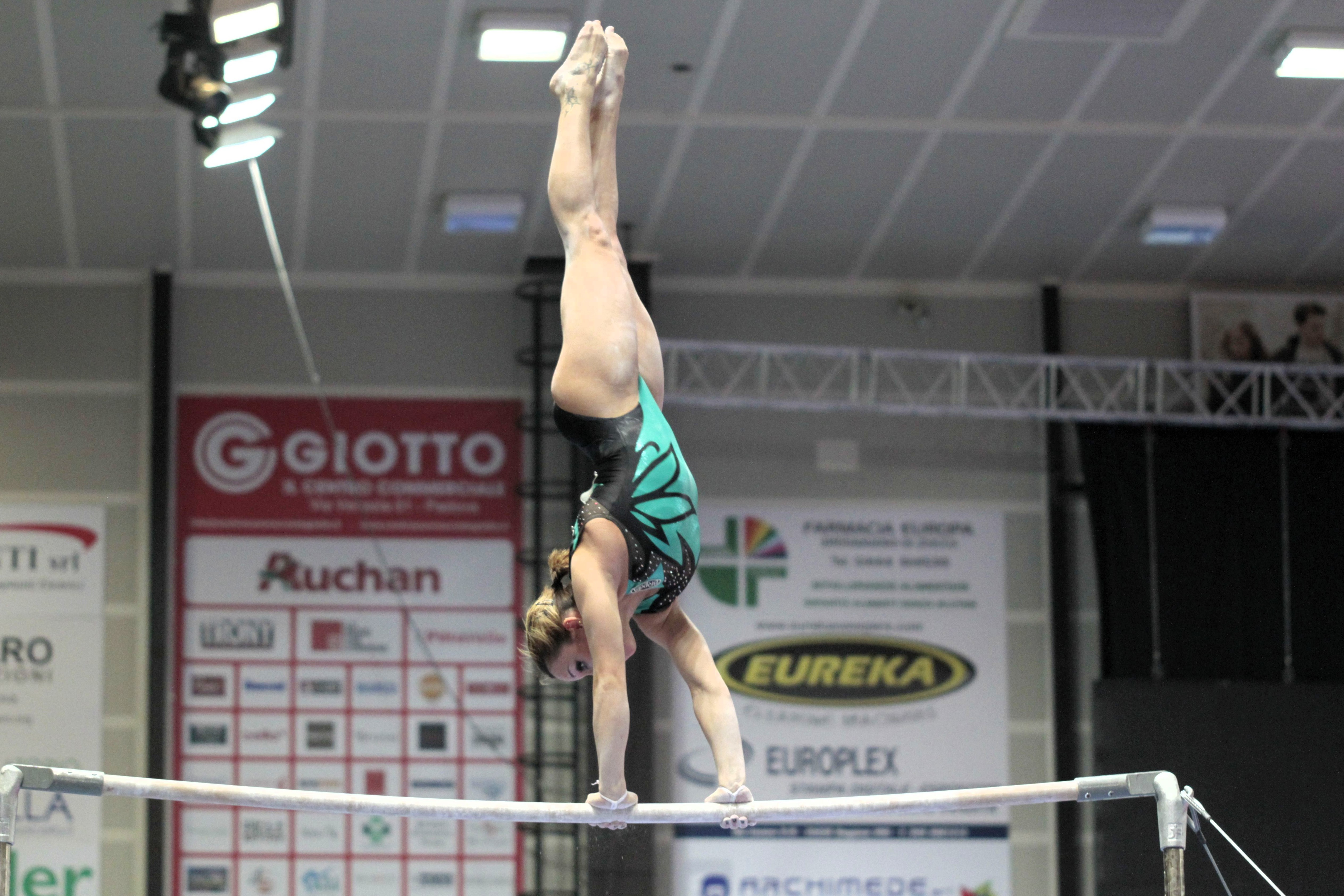 Vanessa Ferrari. Padova, 23 febbraio 2013